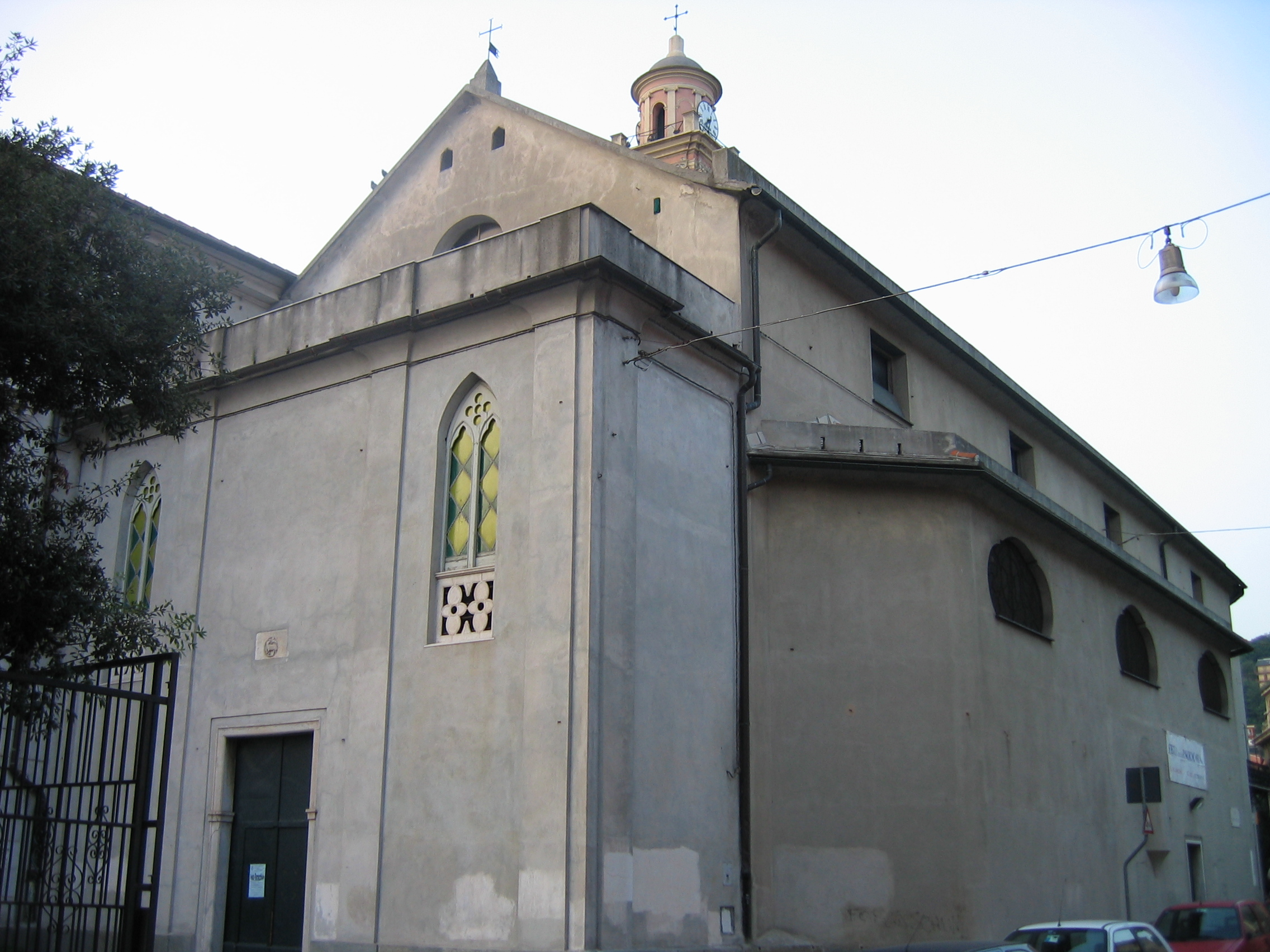 Chiesa parrocchiale di S. Francesco alla Chiappetta in Bolzaneto (Genova)